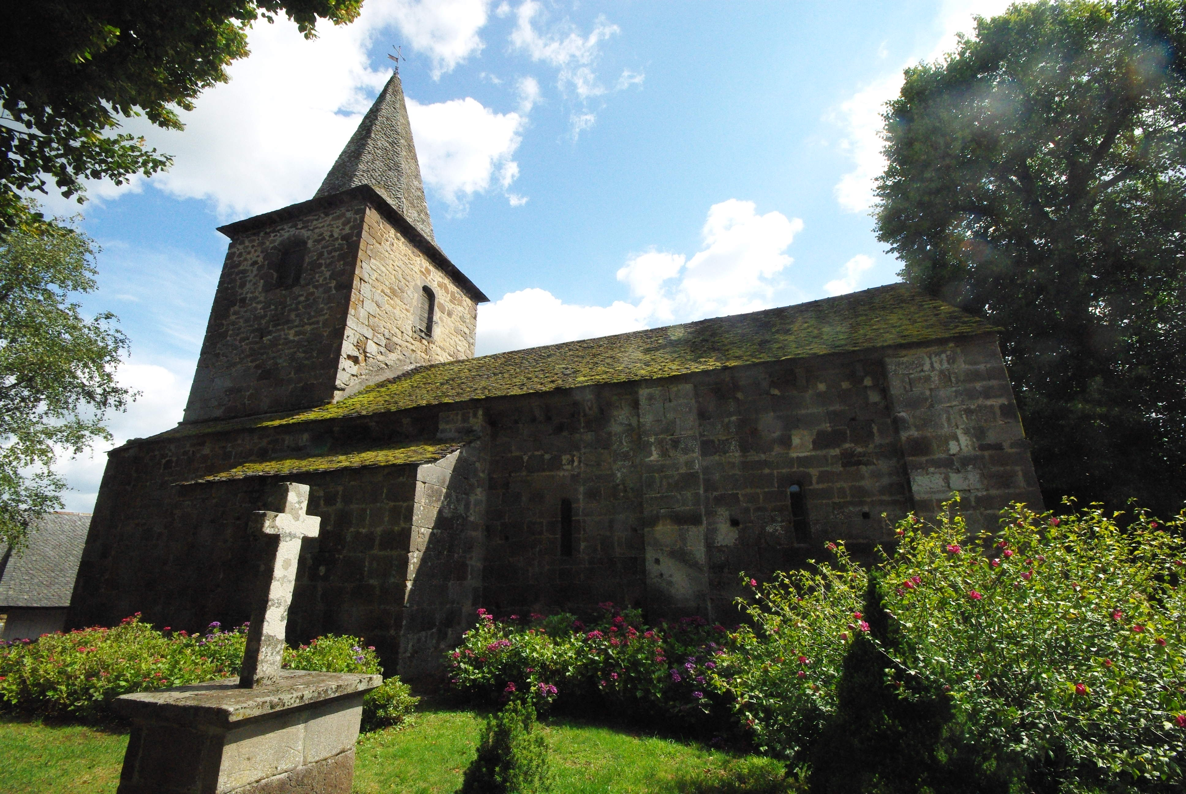 Église Saint-Martin .